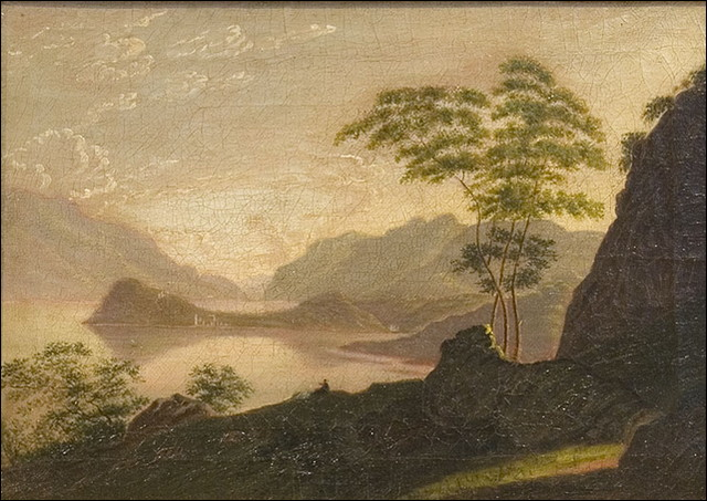 Oil on linen, Villa Menaggio, Lago di Como